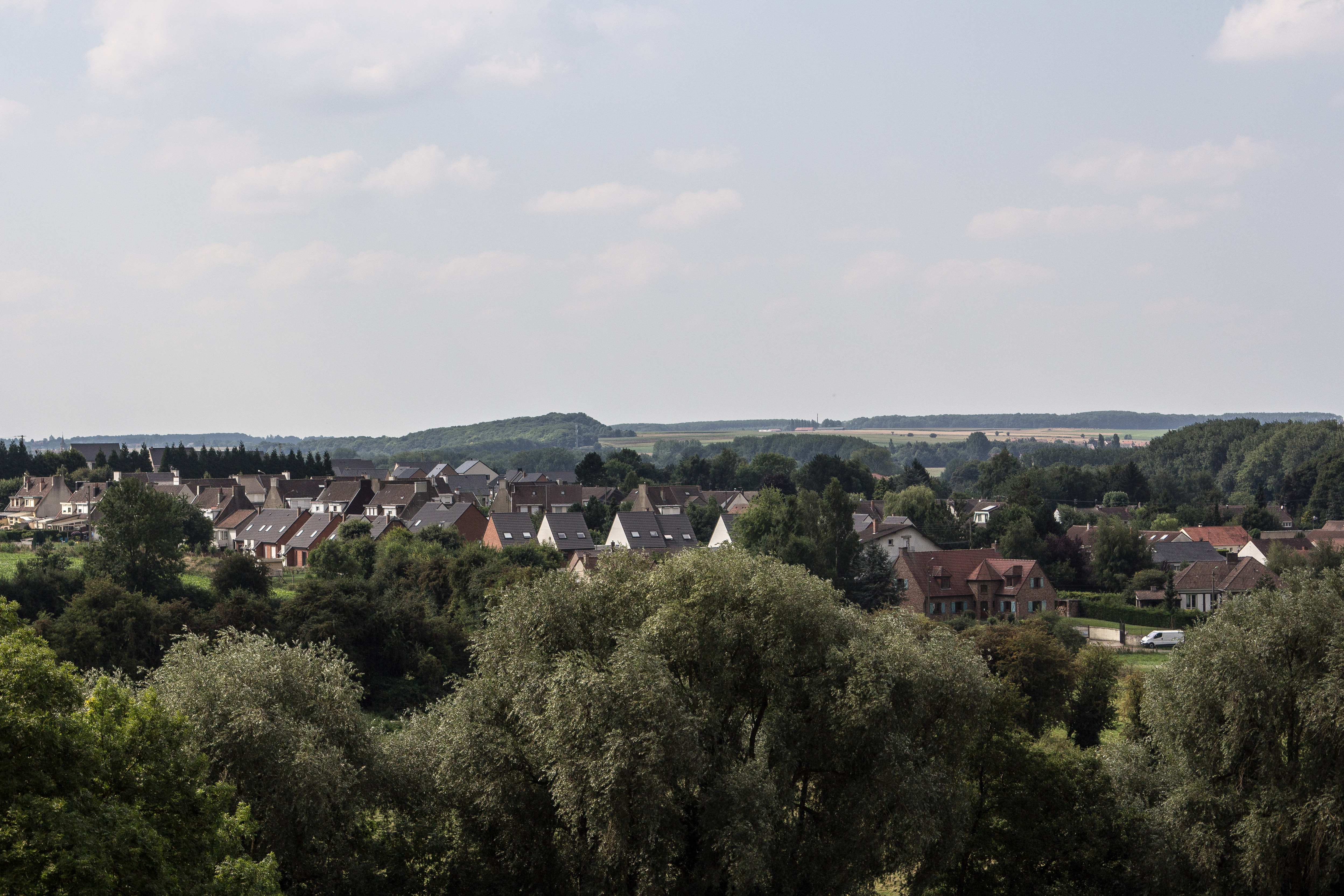 Vue de Souchez / Souchez / Pas-de-Calais / France